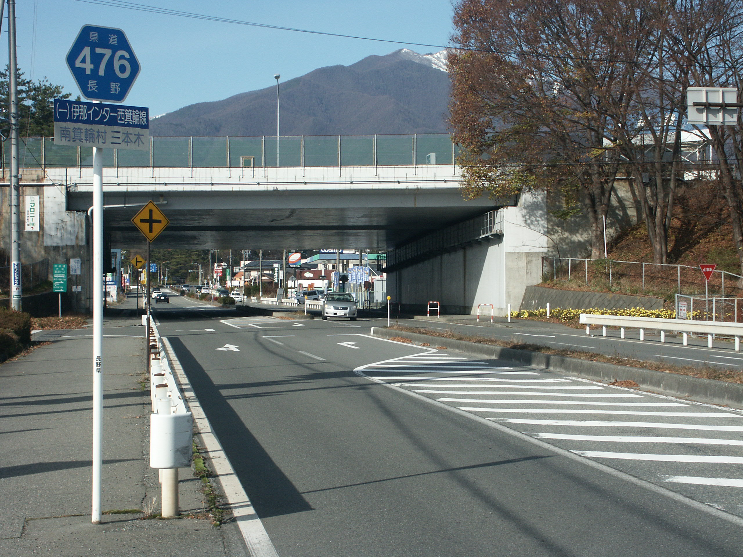 長野県道476号線南箕輪村三本木付近